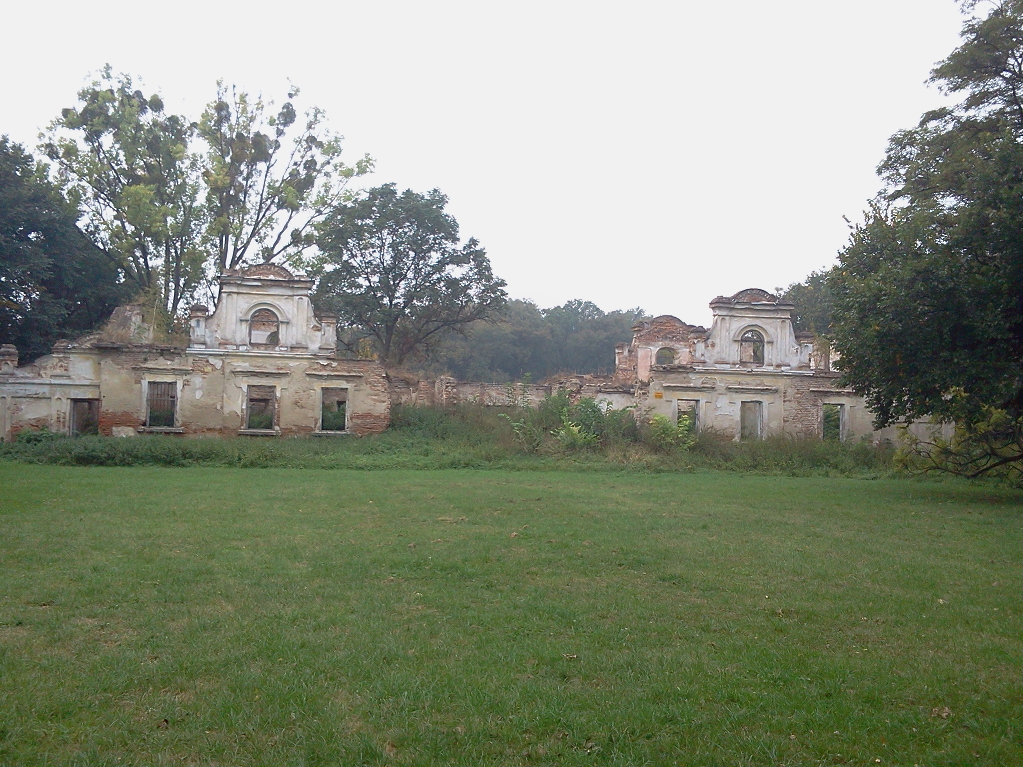 Moroczyn - dwór, XVIII/XIX, 1900-1905